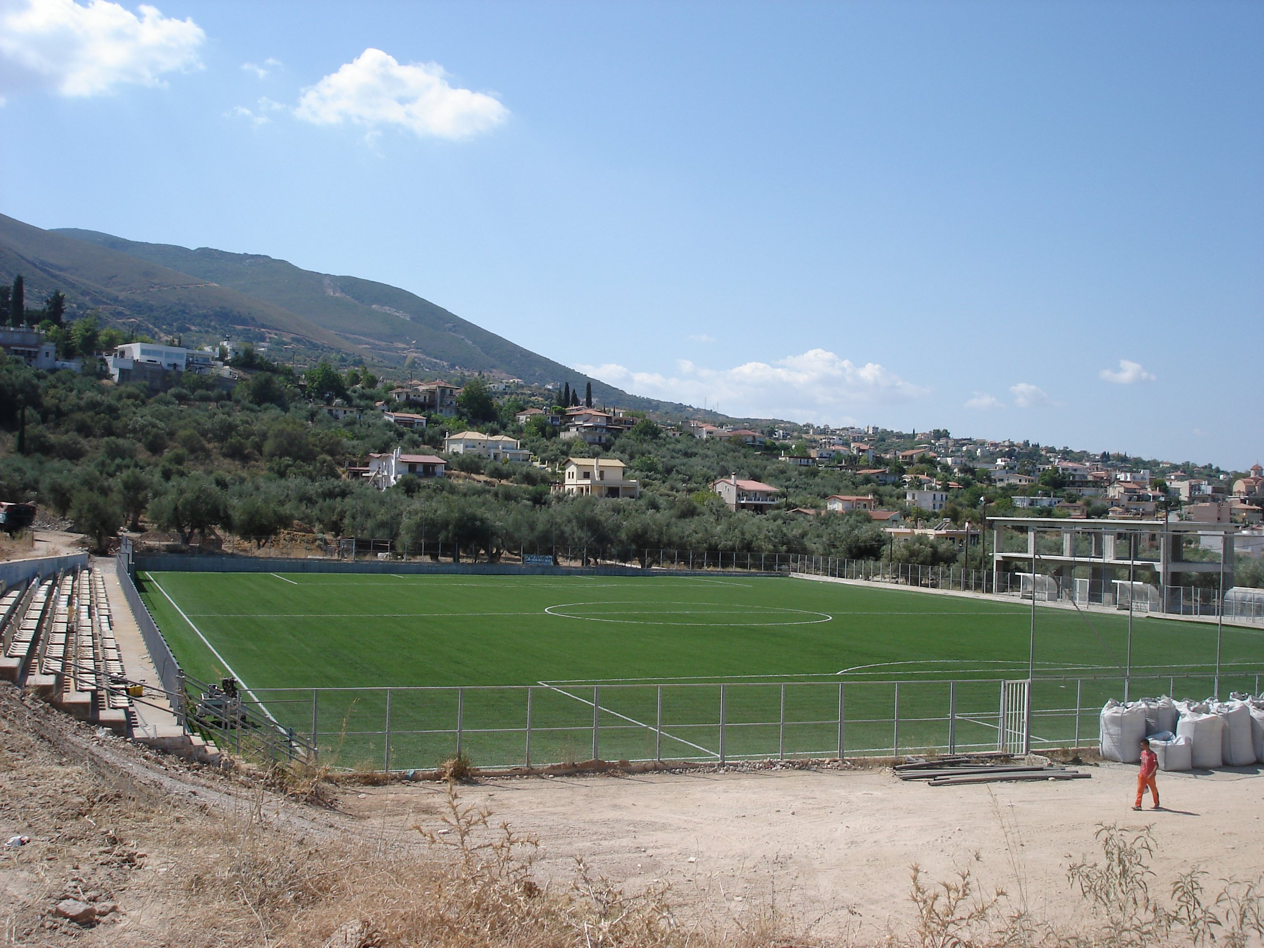 Saravali Groud Greece